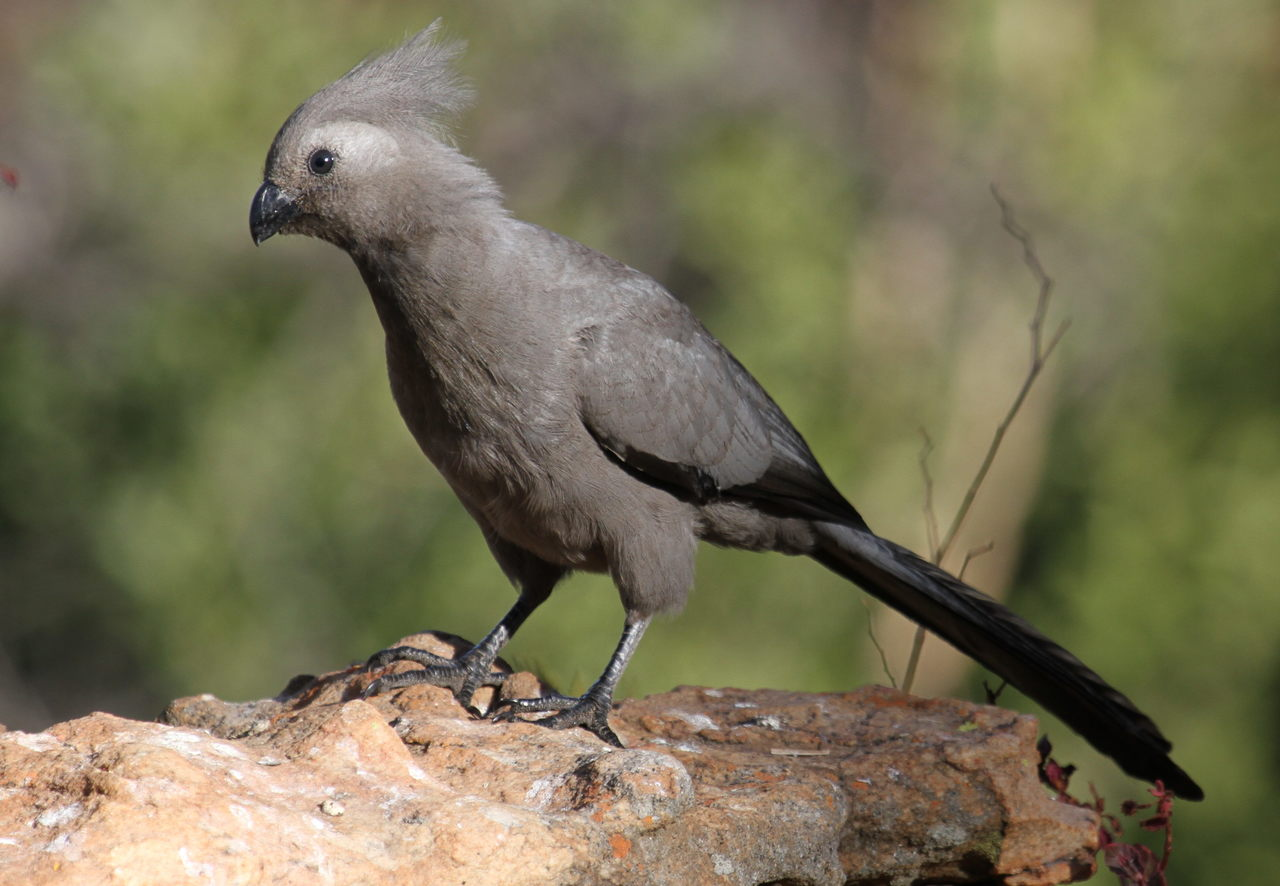 Grey go-away bird